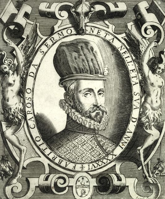 Holzschnitt von Fabritio Caroso Vorblatt zum Titel von "Nobiltà di Dame"